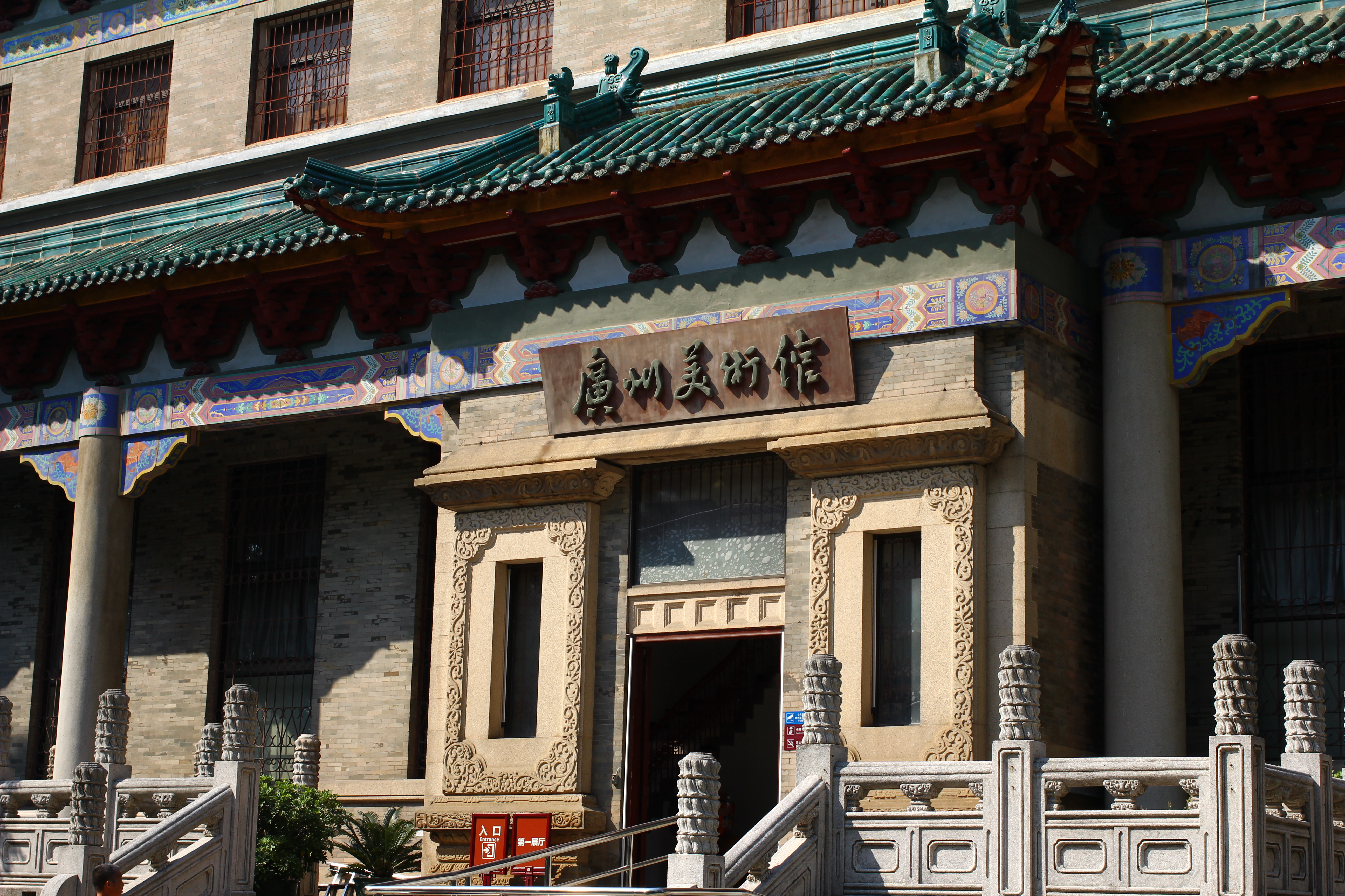 廣州美術館大門